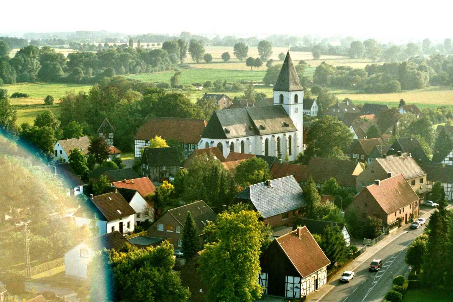 Ev. Pfarrkirche St. Othmar Dinker This is a photograph of an architectural monument.